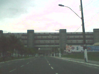 Frente do Centro de Convenções da Bahia, Salvador Bahia, Brasil.